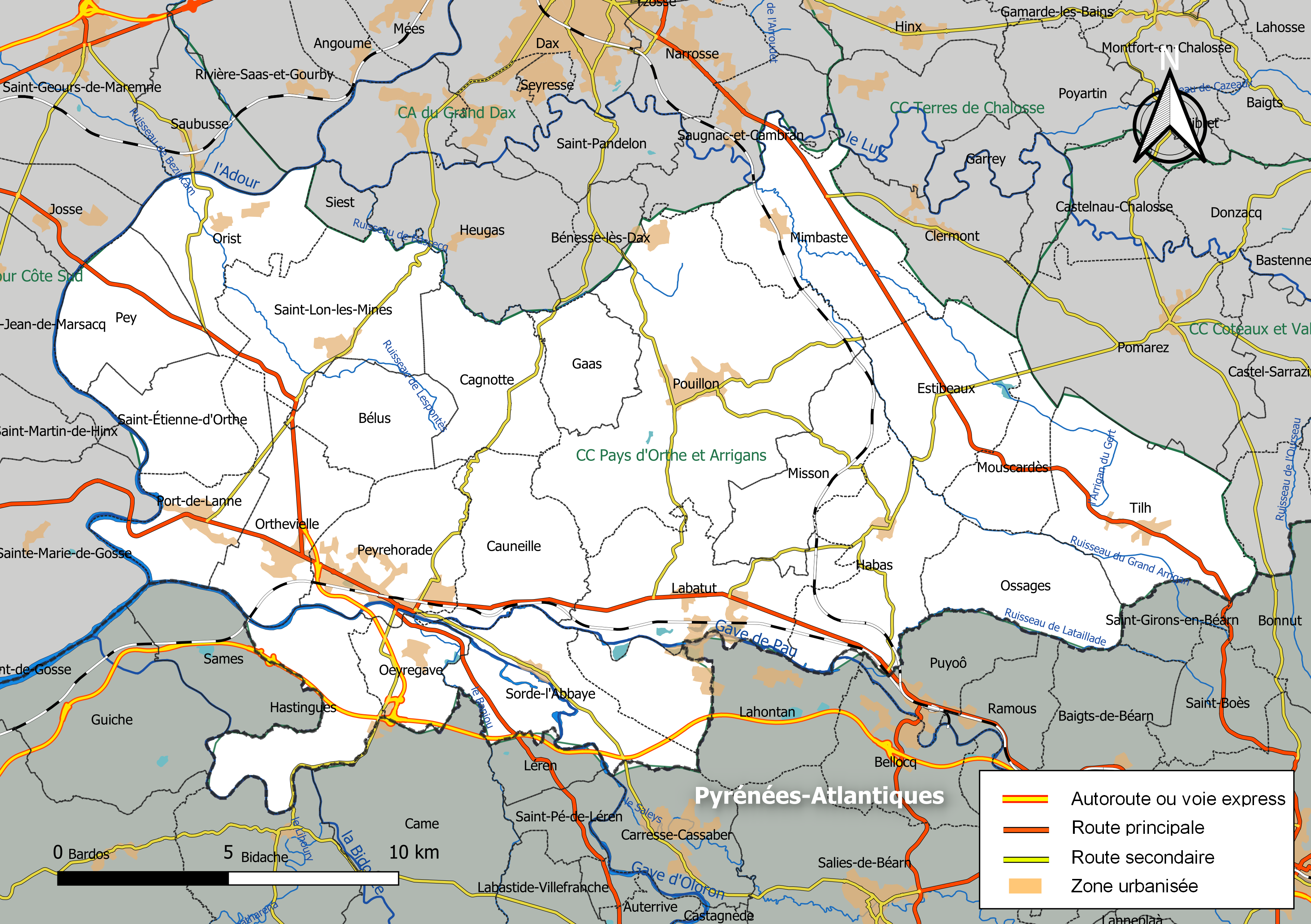 Carte géographique de la Communauté de communes Pays d'Orthe et Arrigans, département des Landes, France. Composition au 1er janvier 2019.